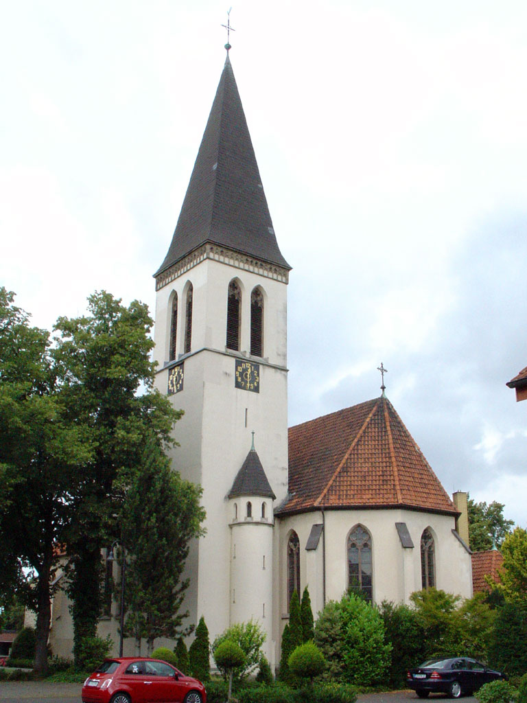 St. Antonius, Benteler (katholisch)